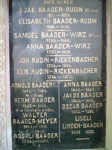 Familiengrab Baader “ HIER RUHEN J. Jak. Baader-Rudin Dr. med. 1810-1879 Elisabeth Baader-Rudin 1819-1878 Samuel Baader-Wirz Dr. med. 1780-1845 Anna Baader-Wirz 1782-1829 [..] ”